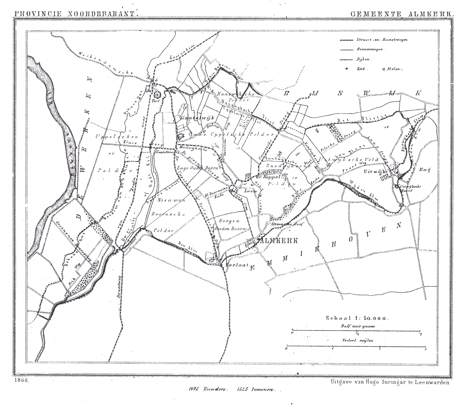 Nederland, Noord-Brabant, Gemeente Almkerk